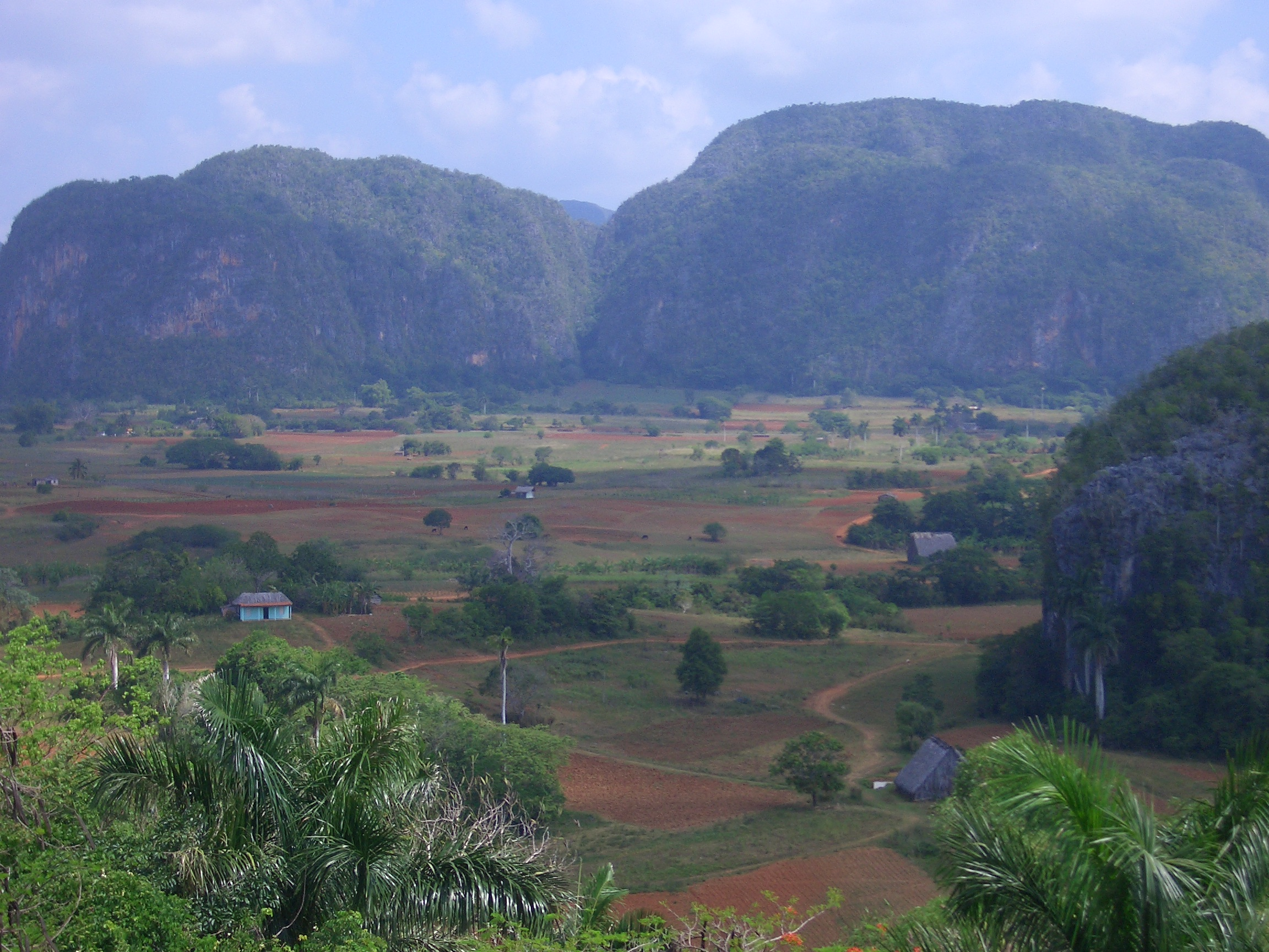 Valle des Viñales, Cuba